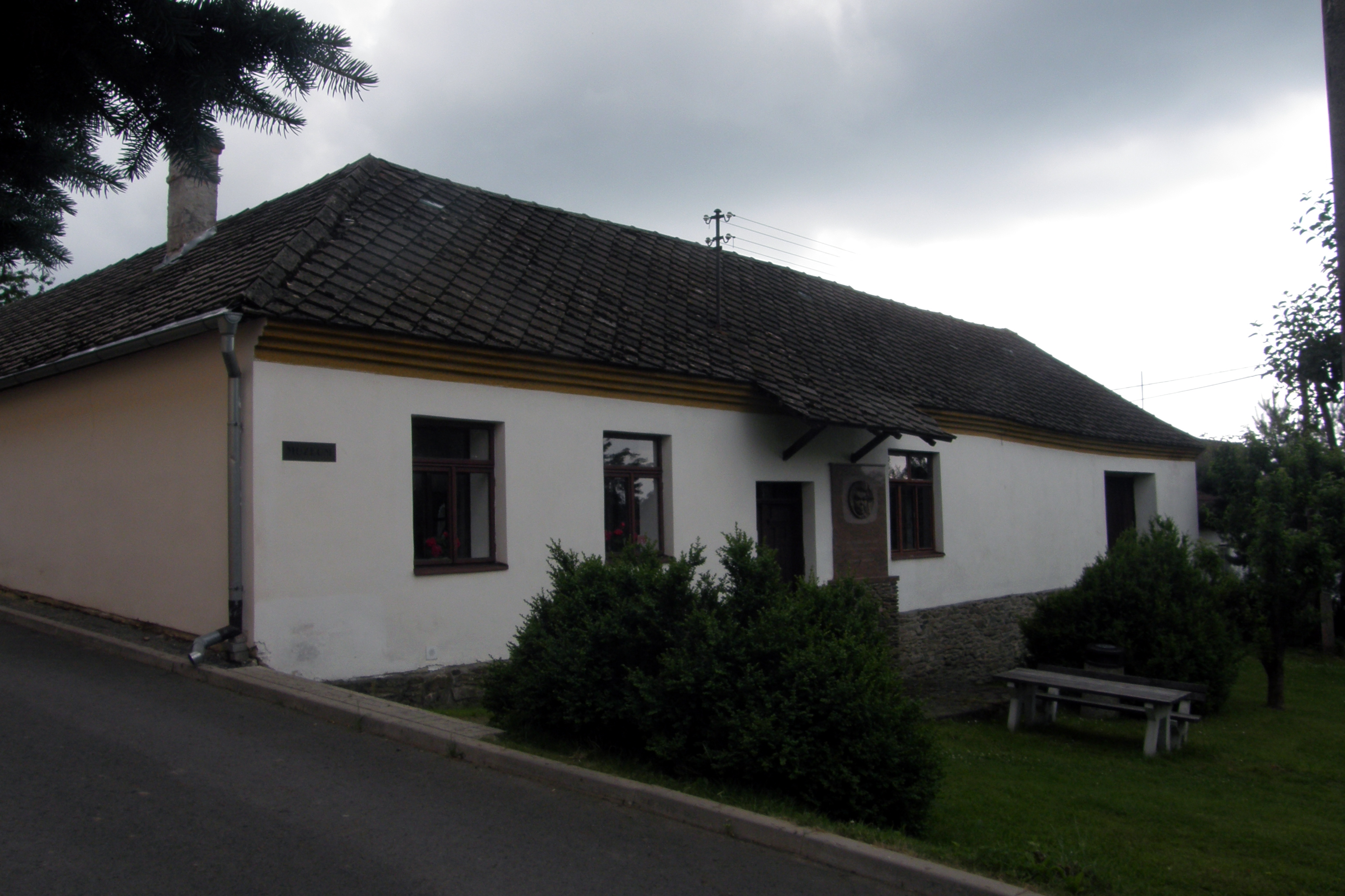 Budova muzea v Kořenci